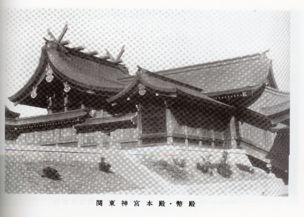 关东神宫本殿与币殿